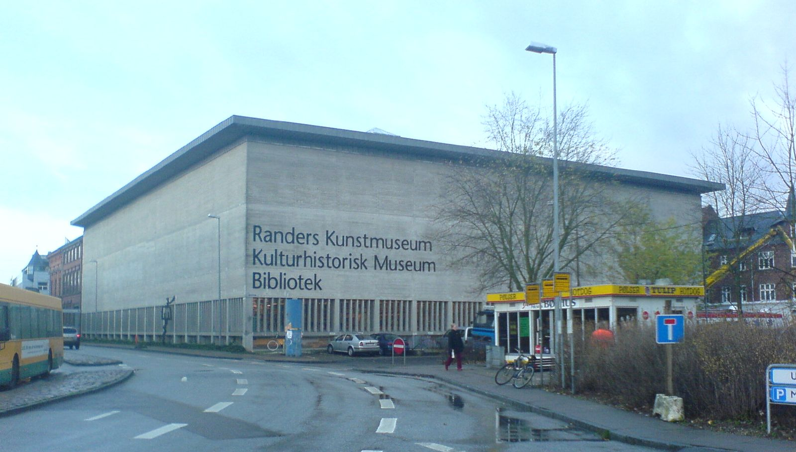 Randers Bibliotek og Kulturhus